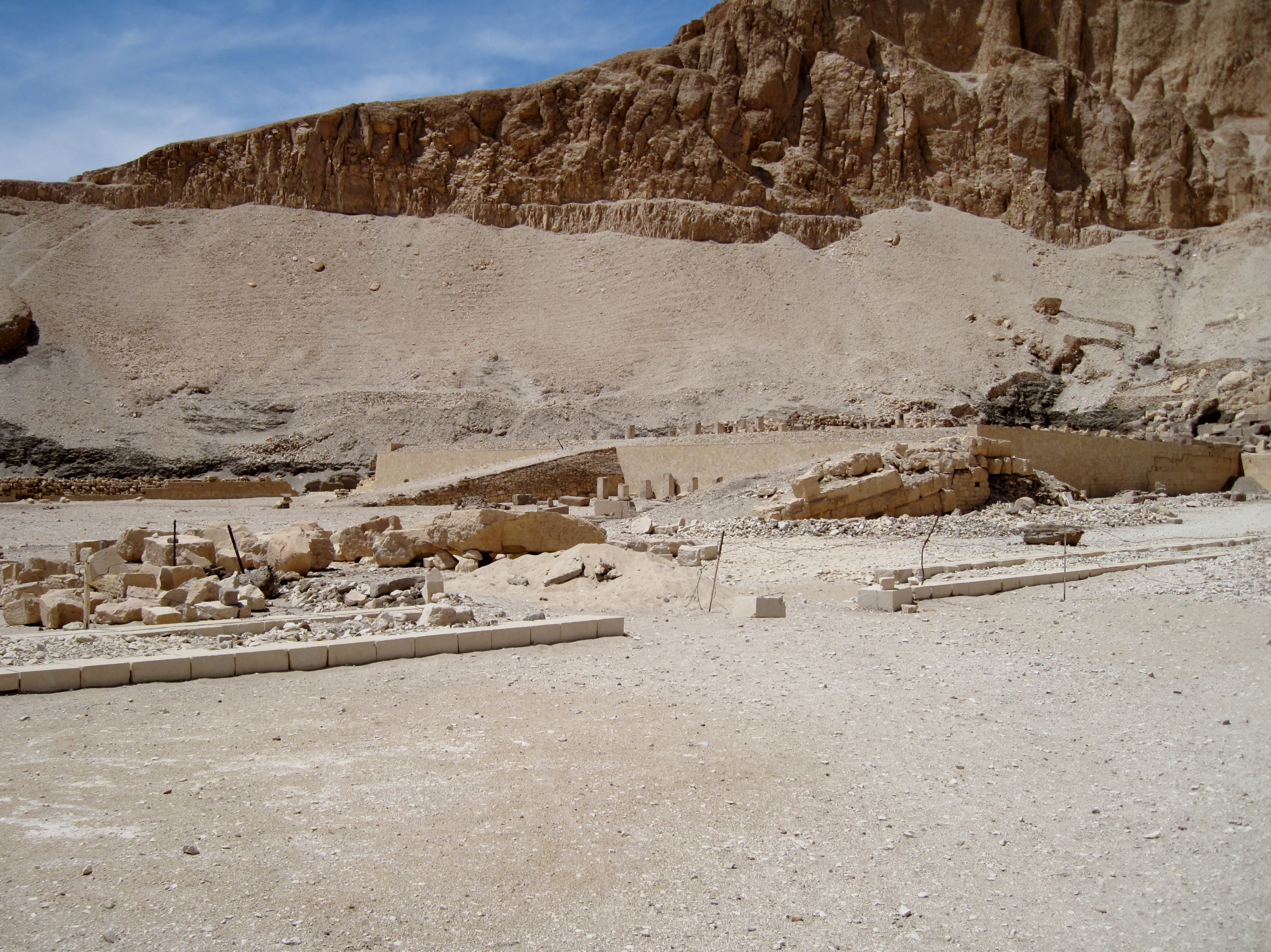 Reste des Totentempels von Pharao Mentuhotep II. aus dem „Mittleren Reich“ in Deir el-Bahari (arabisch für „Nordkloster“), Theben-West (Luxor), Ägypten